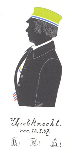 Wilhelm Liebknecht als Student im Couleur des Corps Hasso-Nassovia Marburg, Schattenriss (Silhouette) eines unbekannten Künstlers von 1847, Rechte abgelaufen, Public Domain